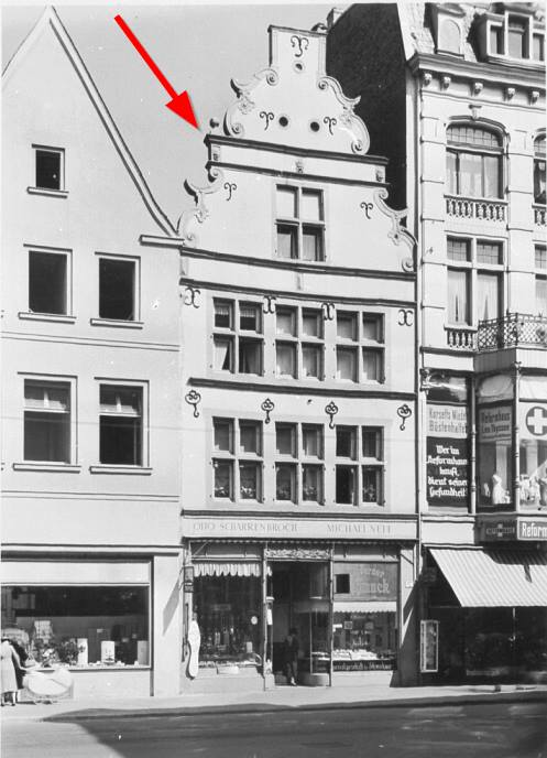 Das Haus Oberstr. 37